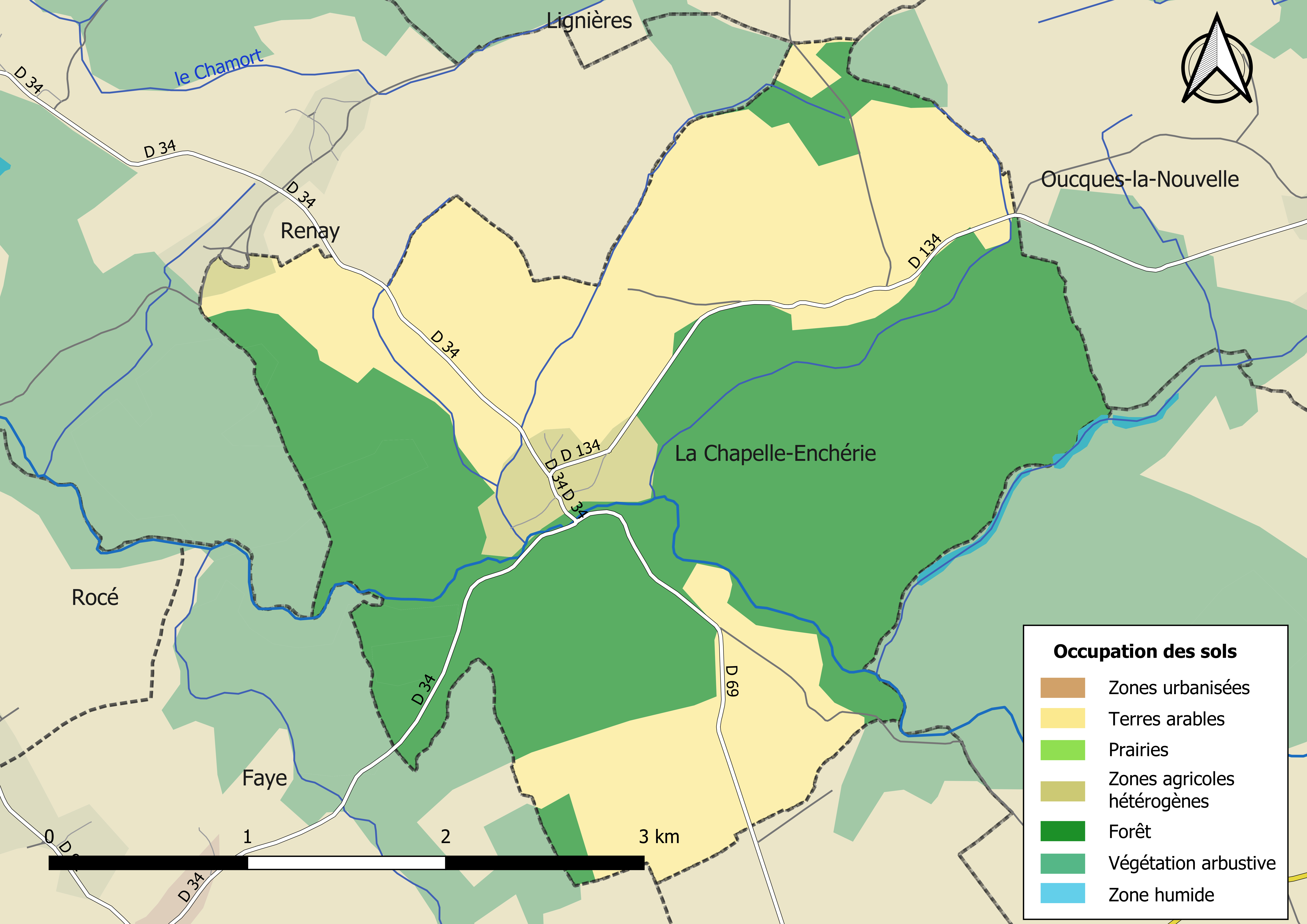 Carte des infrastructures et de l’occupation des sols en 2018 de la commune de La Chapelle-Enchérie (France).